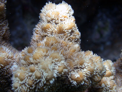 Detalle de pólipos de Hydnophora exesa, Samoa Americana